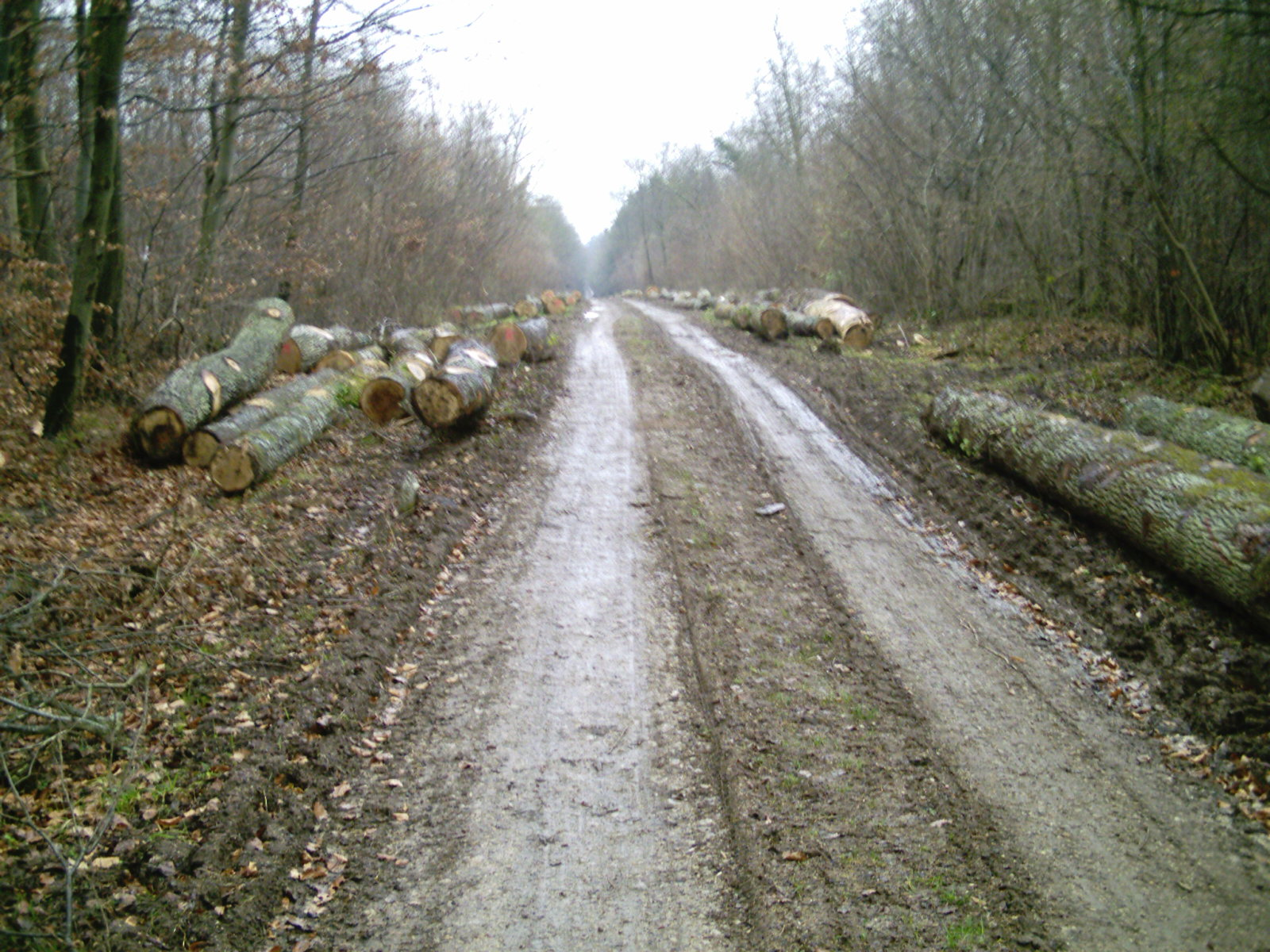 Grumes au bord de la route de Clairlieu dans la petite Haye (commune de Laxou)